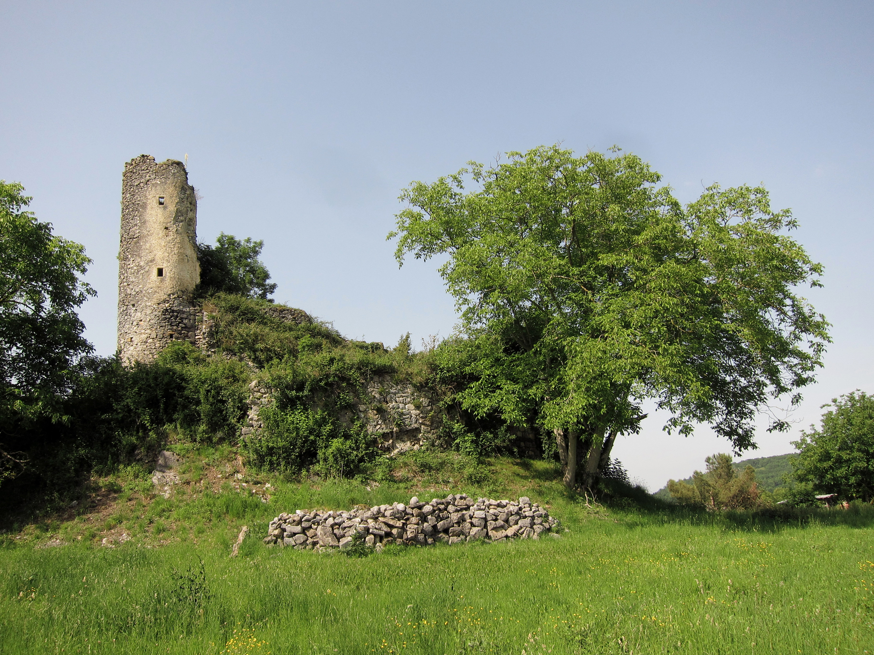 Saleich (Haute-Garonne, Midi-Pyrénées, France) : Le Château de Saleich.